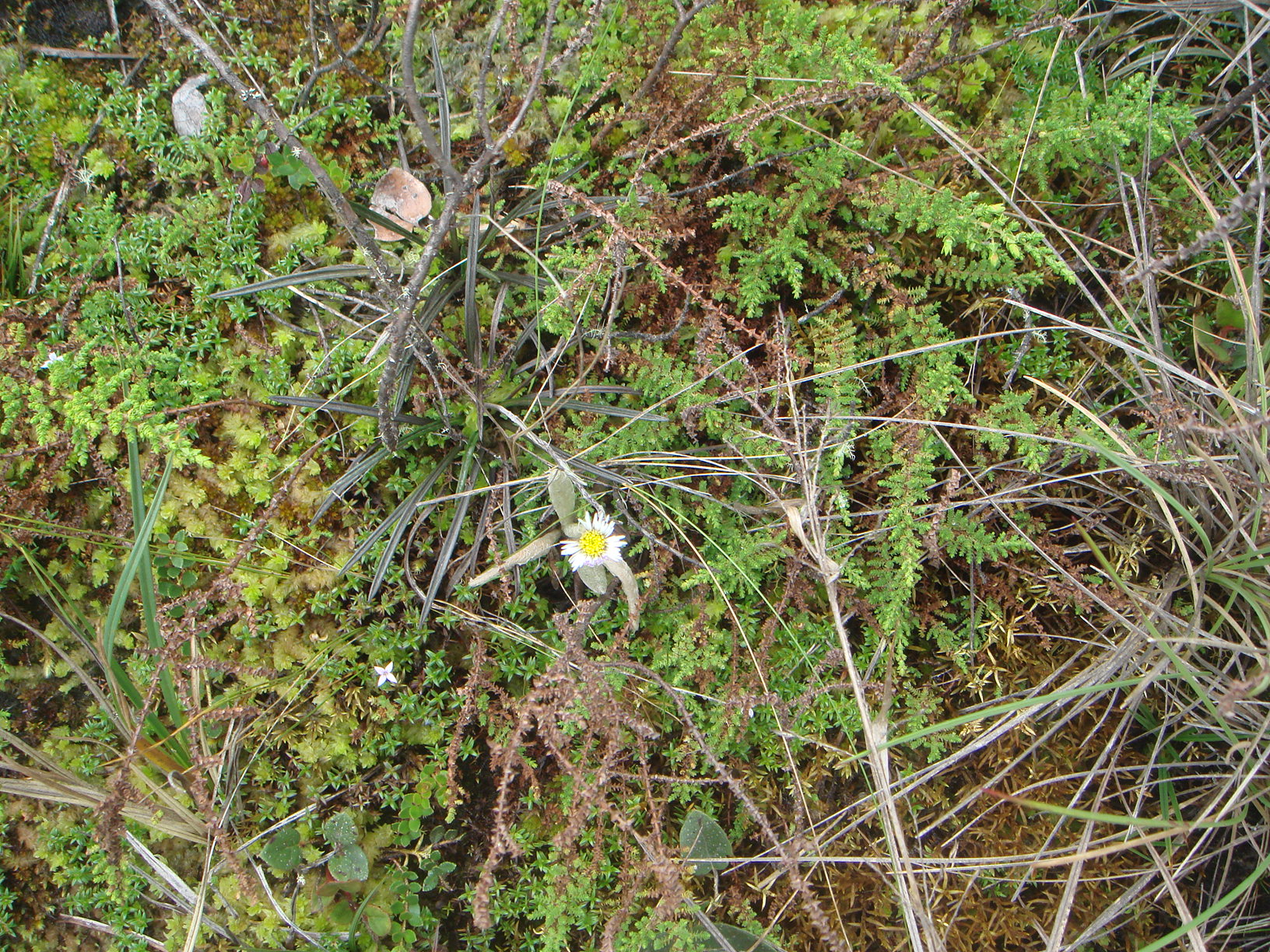 (Oritrophium peruvianum), Páramo de Guasca, Junín,Cundinamarca, Colombia.